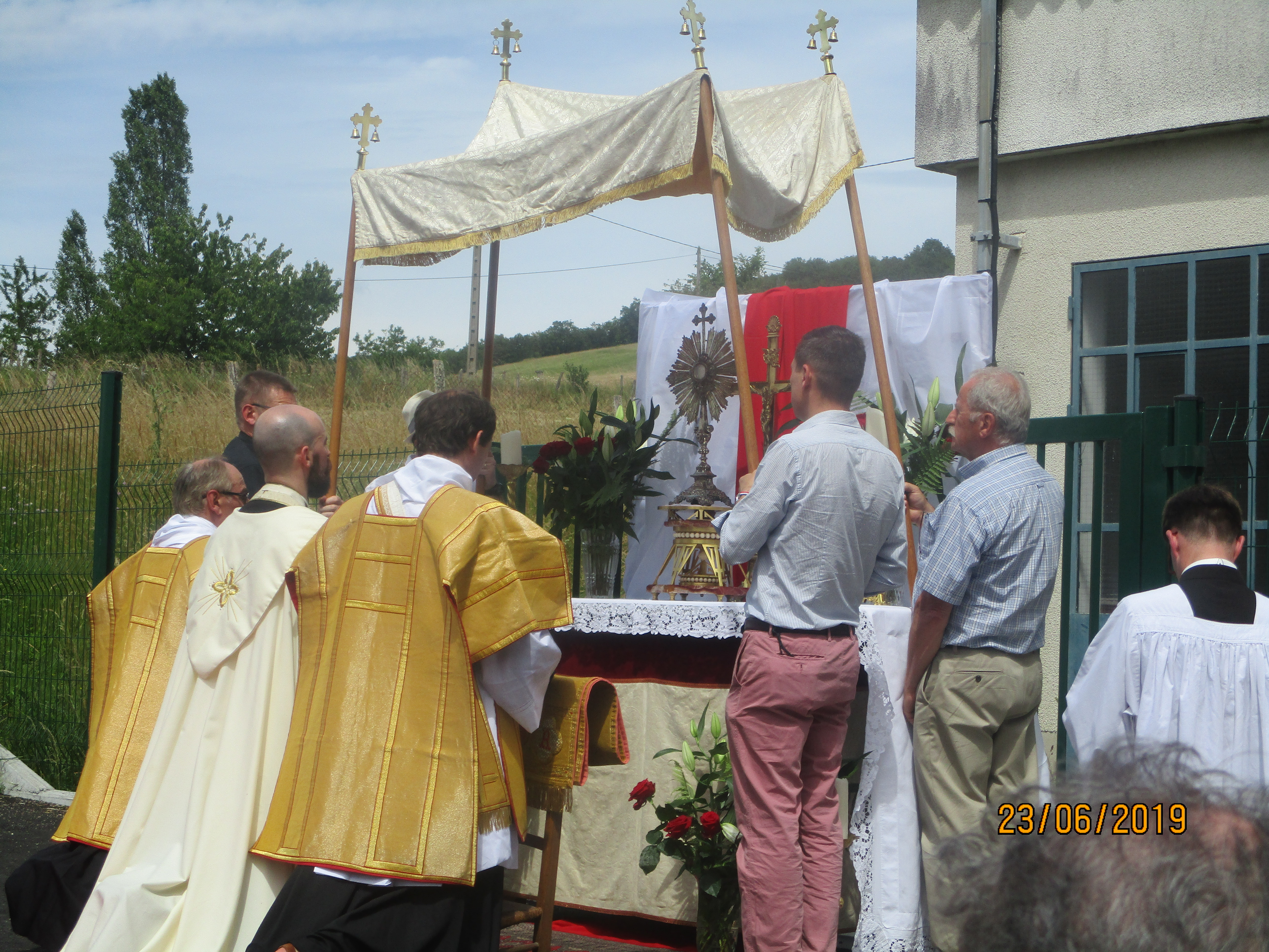 Station de la procession de la Fête-Dieu à Véron dans l'Yonne, le 23 juin 2019.